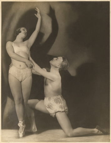 Gizela Bravničar in Peter Golovin.